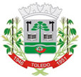 Brasão do Município de Toledo - PR (Fonte: Lei Municipal N. 660/1972)